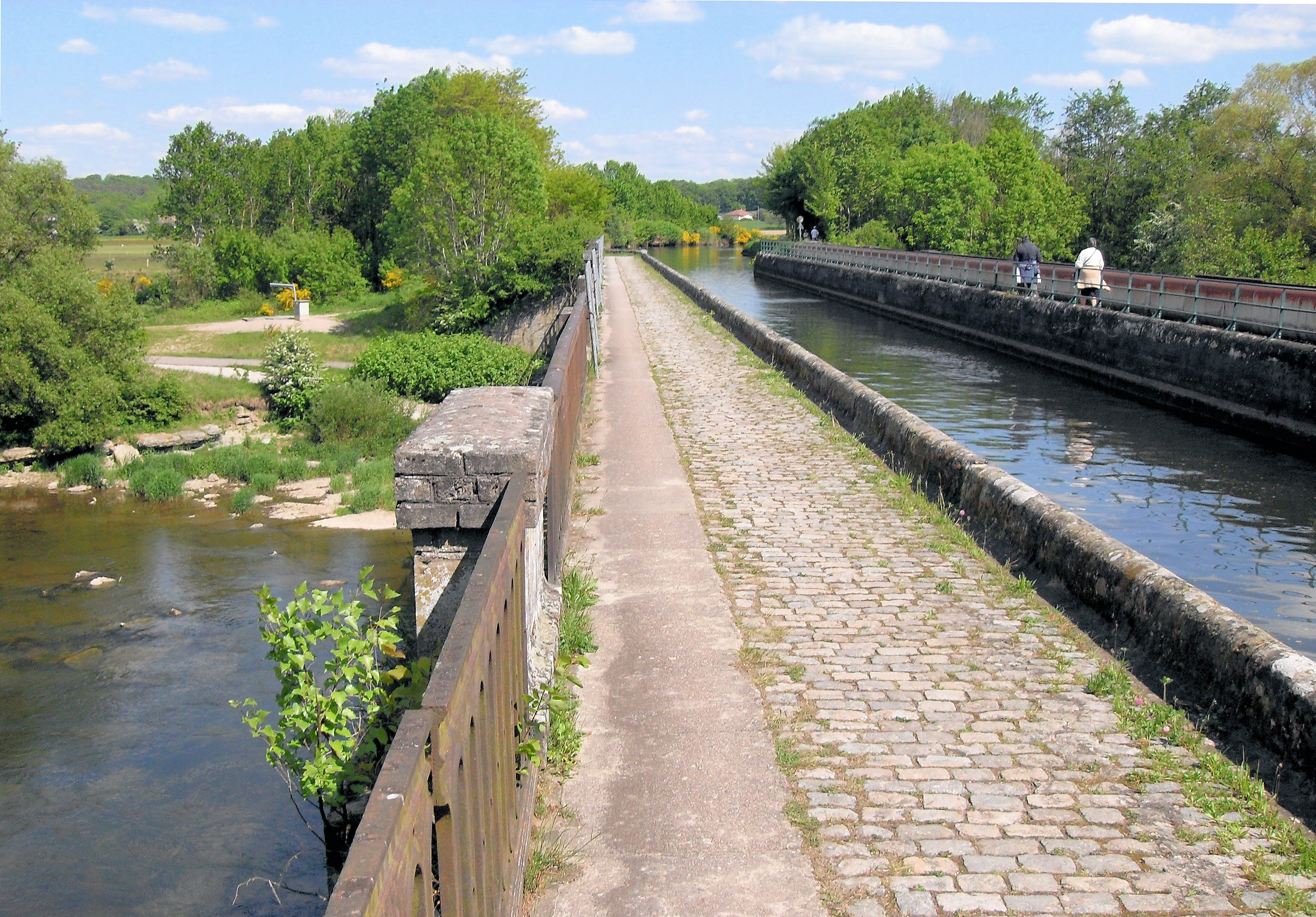 Branche d'Épinal (Canal des Vosges), pont-canal sur la Moselle à Golbey